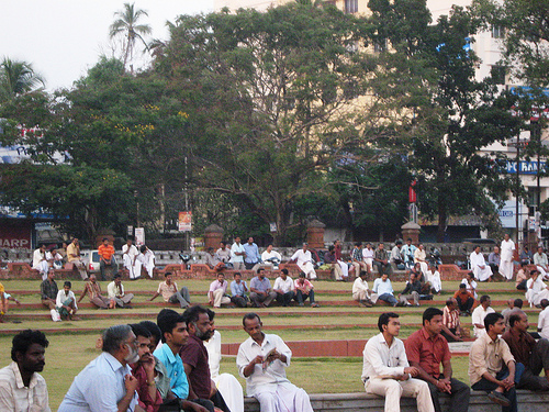 Kannur, Kerala, India.